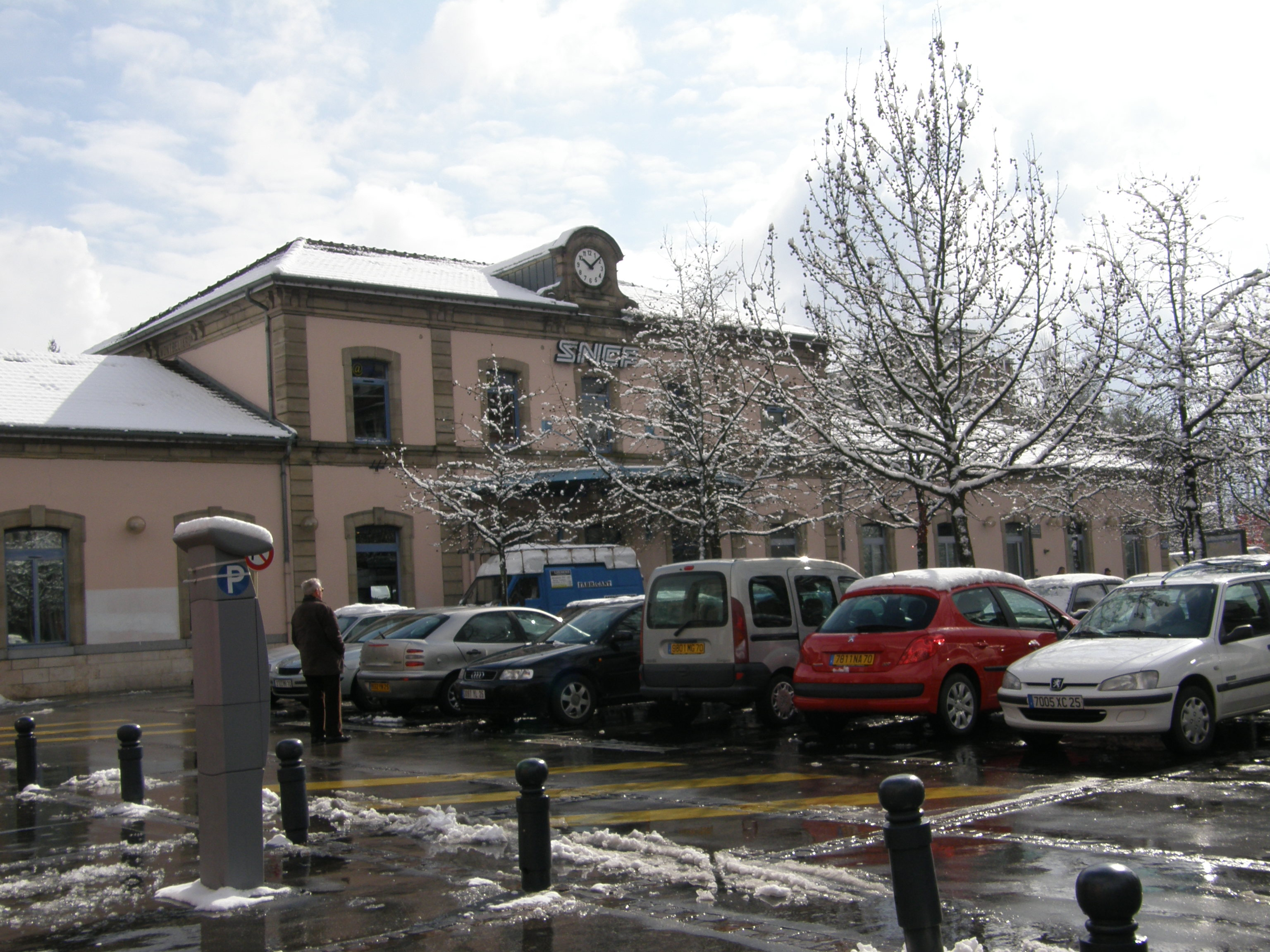 Montbéliard : la gare.